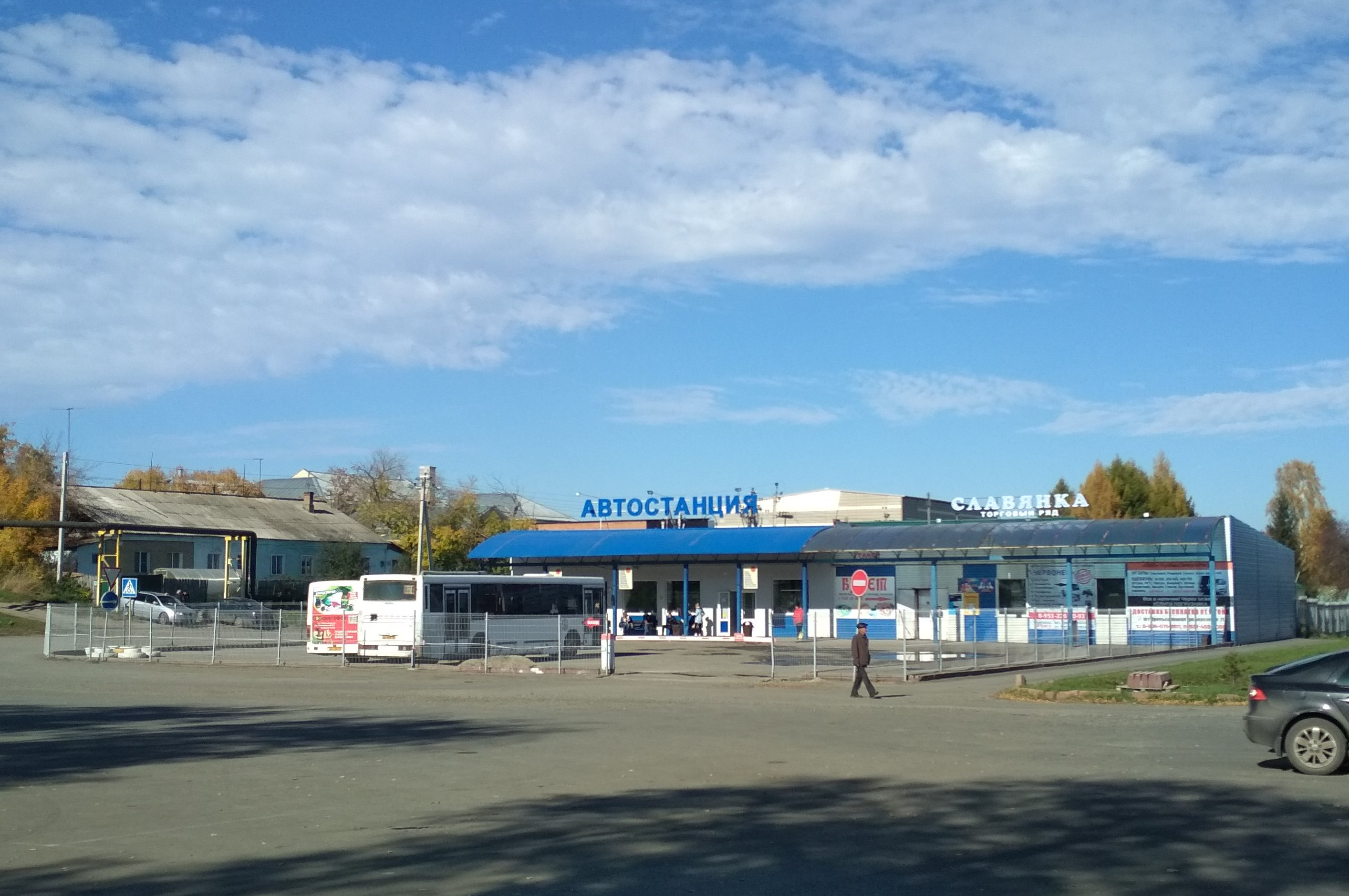 Автостанция, Промышленная Кемеровская область, Россия